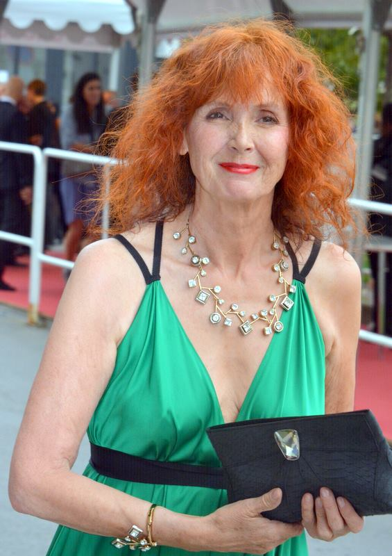 Sabine Azéma au festival de Cannes